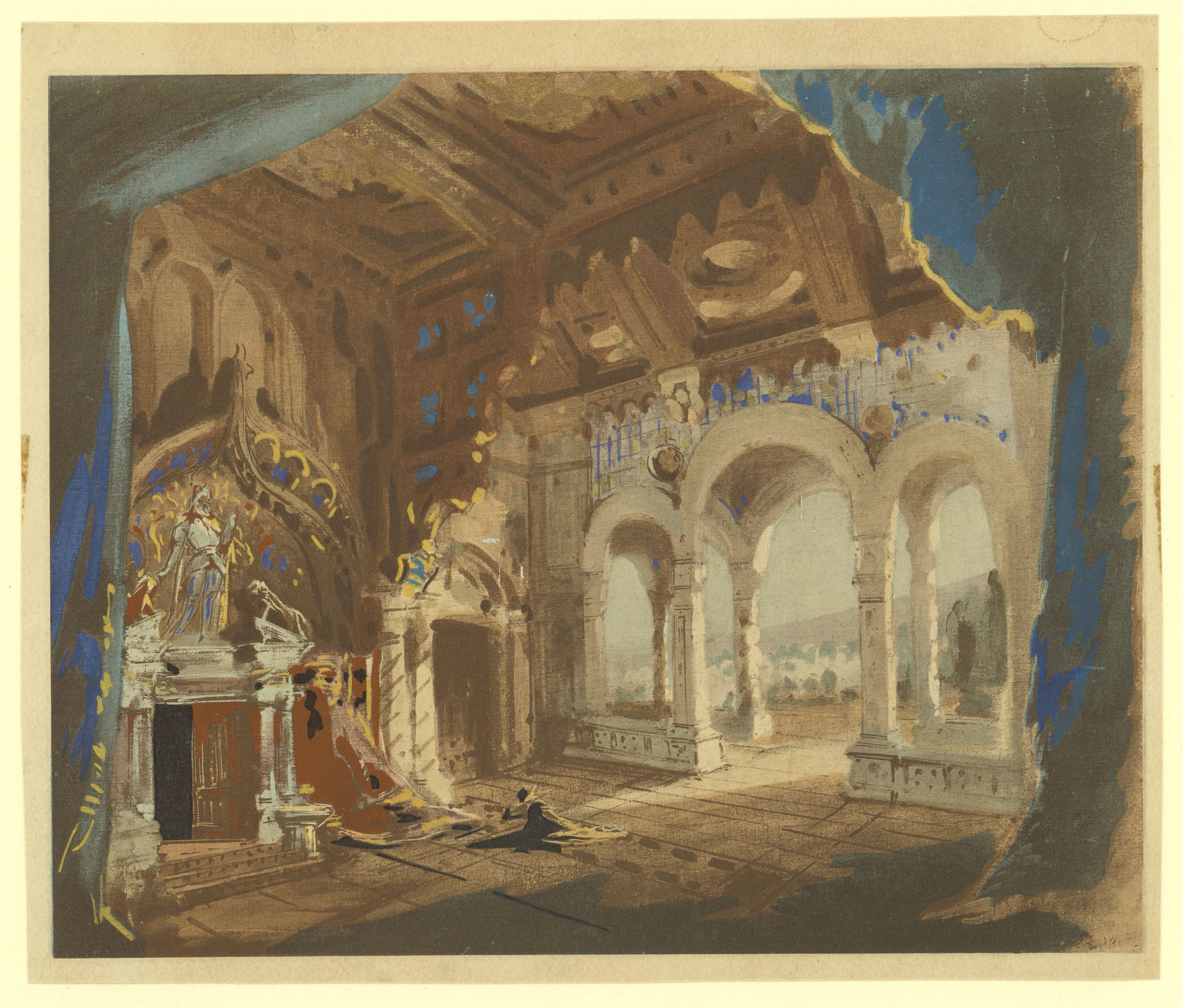 Set design for Paul and Lucien Hillemacher's Orsola. 18.5 x 23 cm. The opera is set in the Cyclades, in the 16th century, and this is almost certainly Act I, given the description in the vocal score: "Un vestibule, dans le palais ducal, ouvert sur une terrasse dominant les jardins, le port et la mer semée d'ilots - Crépuscule. Au fond, une aile du palais avec les appartements de la duchesse. Aux premiers plans ceux du despote, de l'autre côté de la scène. Au milieu un banc de marbre."